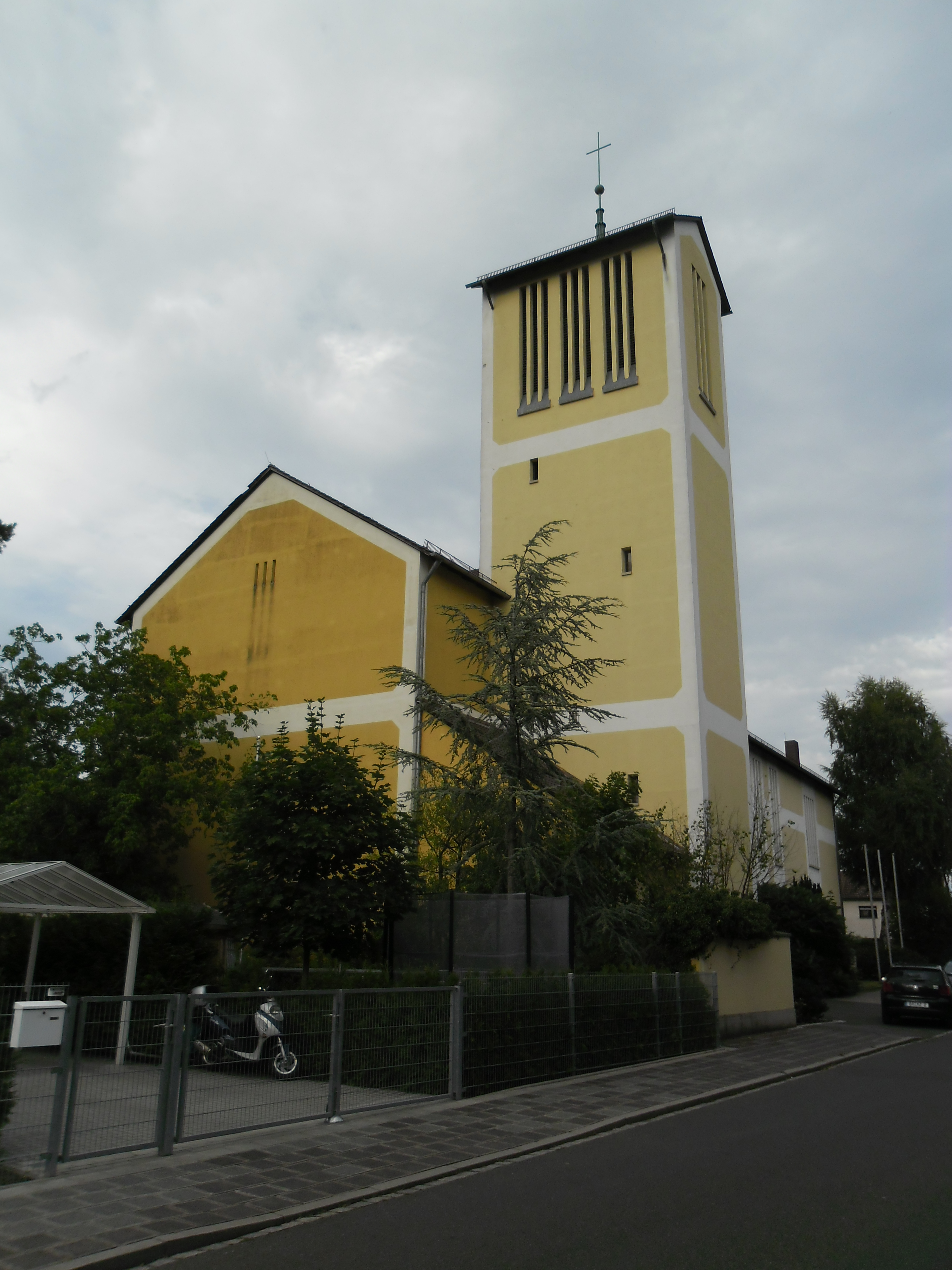 Die katholische Sankt Rupert Kirche in der Leerstetter Straße 4 an der Ecke zur Königshammerstraße in der Nürnberger Kettelersiedlung zwischen Falkenheim und Langwasser